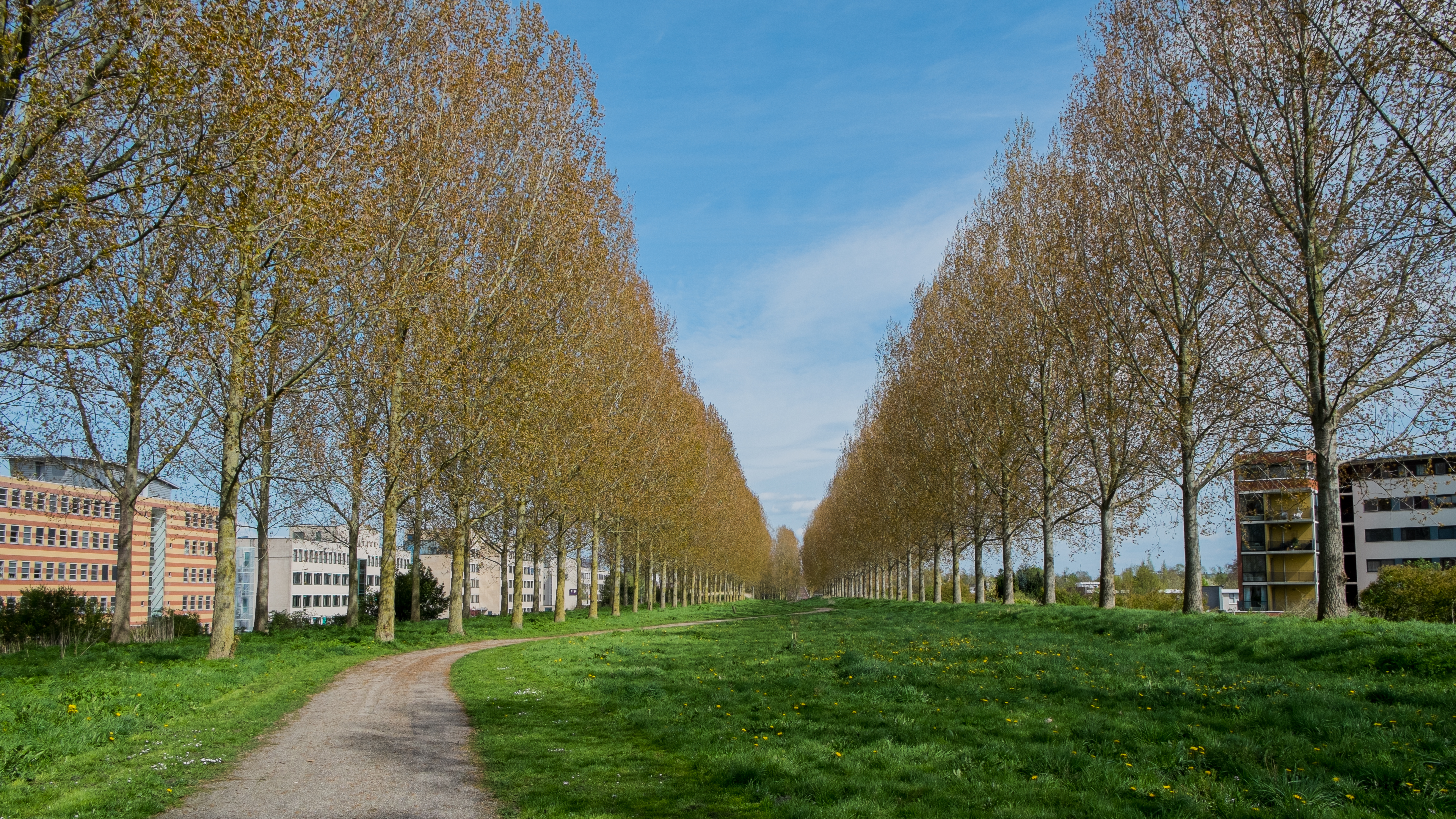 Voormalige vuilstort Hoornse Schans, nu groenpark in wijk Hoornse Park